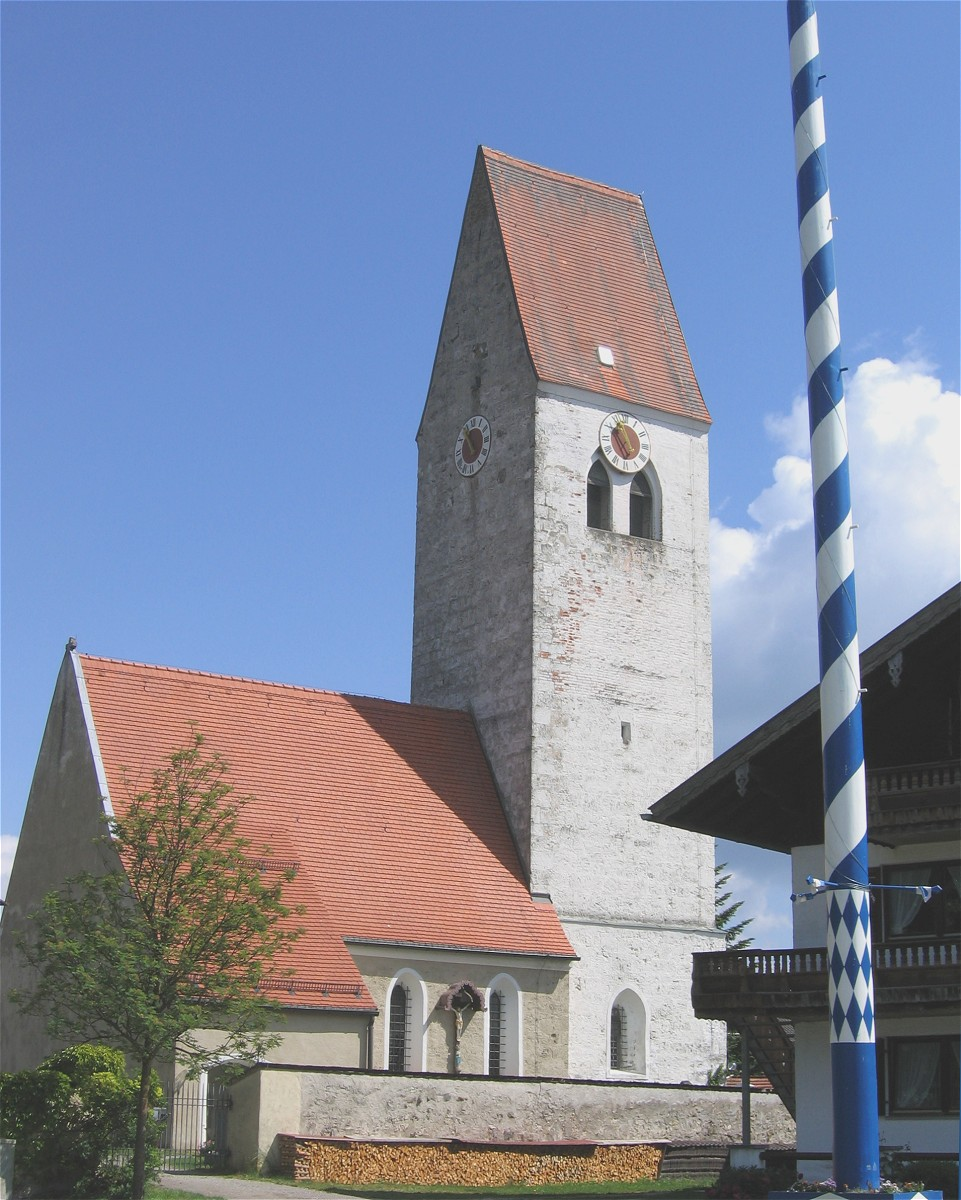 Neufahrn bei Egling